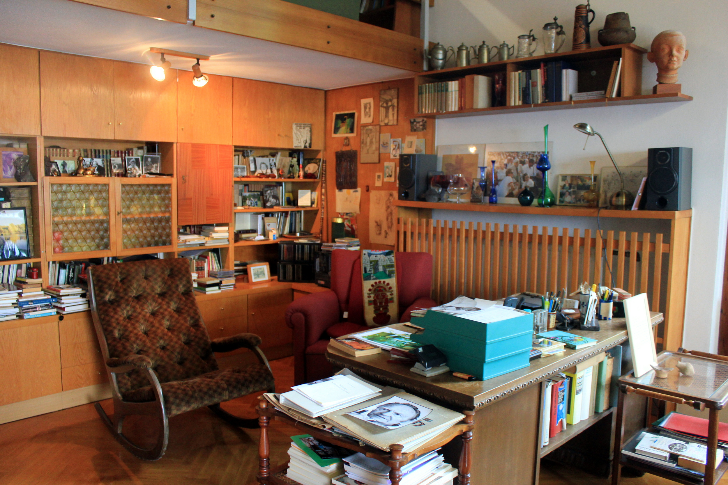 Hornjoserbsce: Dźěłarnja Jurja Brězana w Hornim Hajnku.